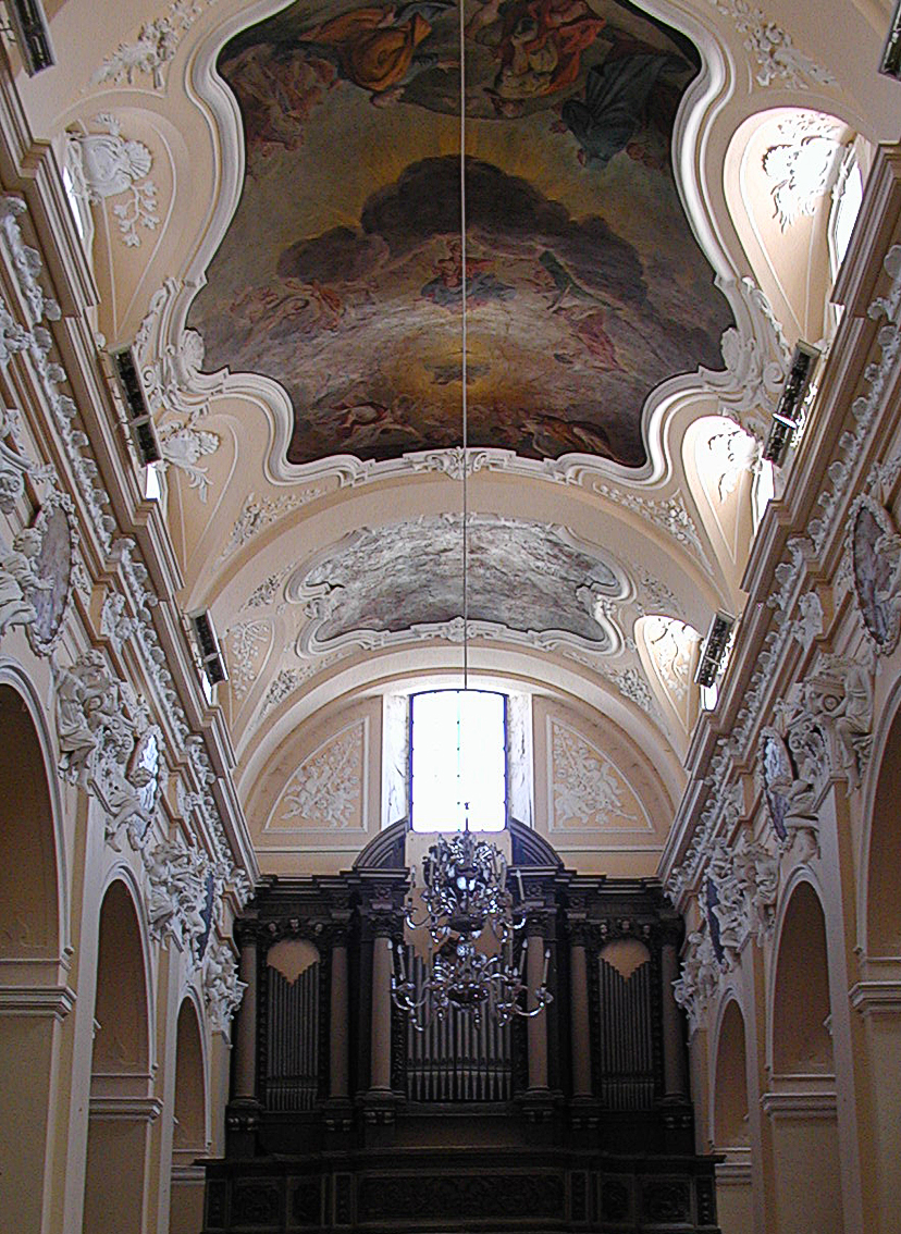 Chiesa della SS. Annunziata